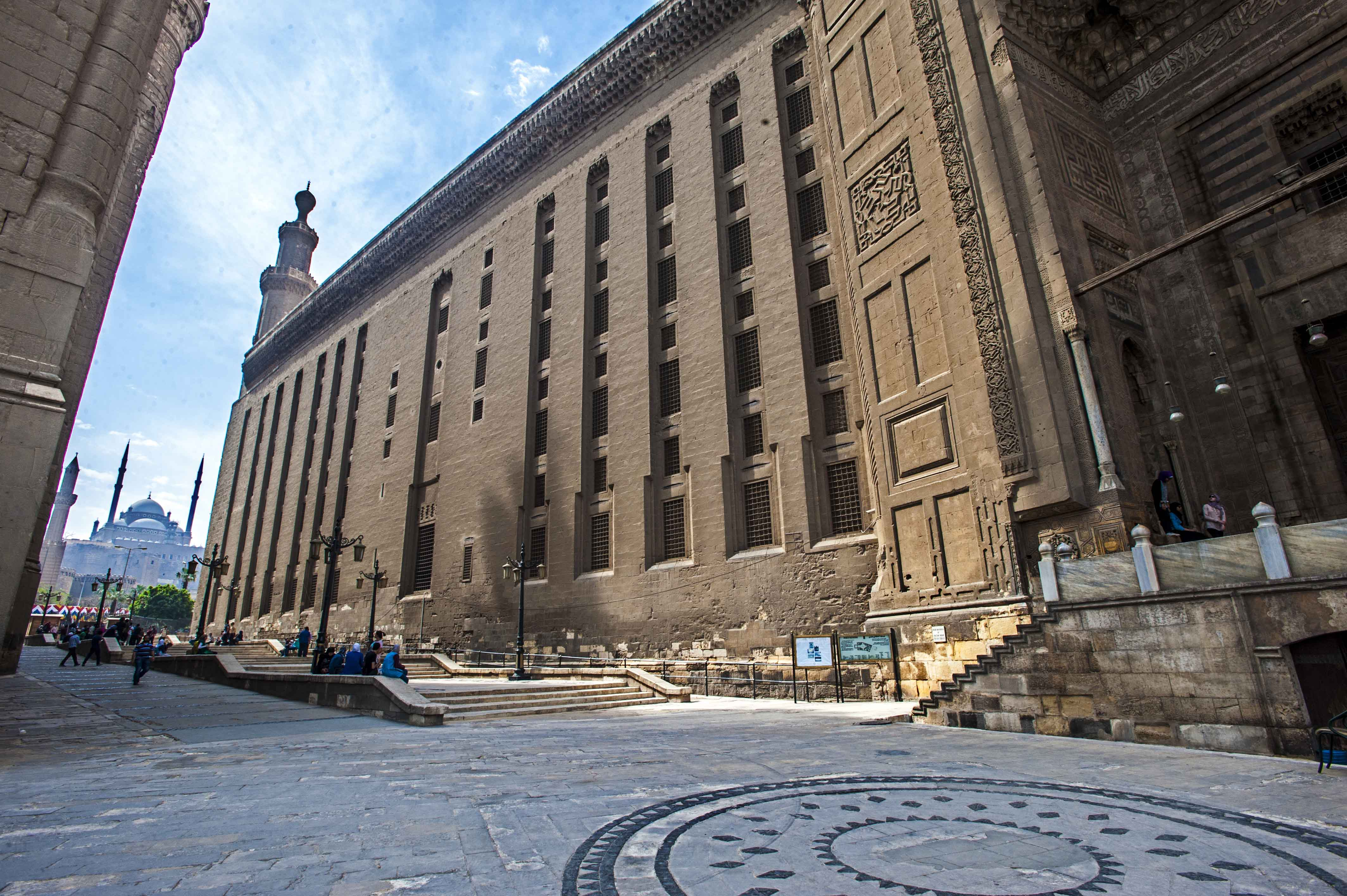 هرم العمارة الاسلامية ...